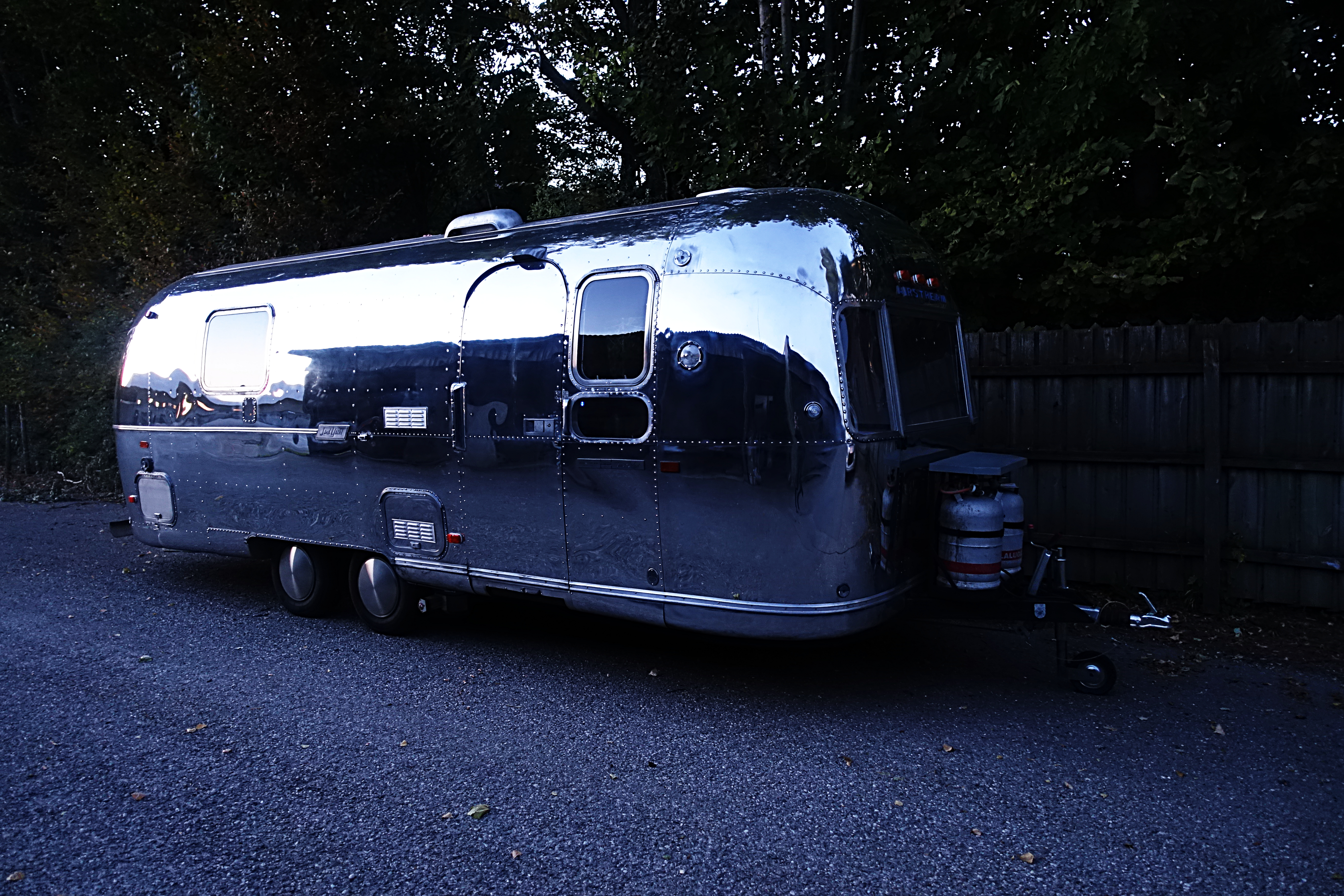 Airstream Nacht